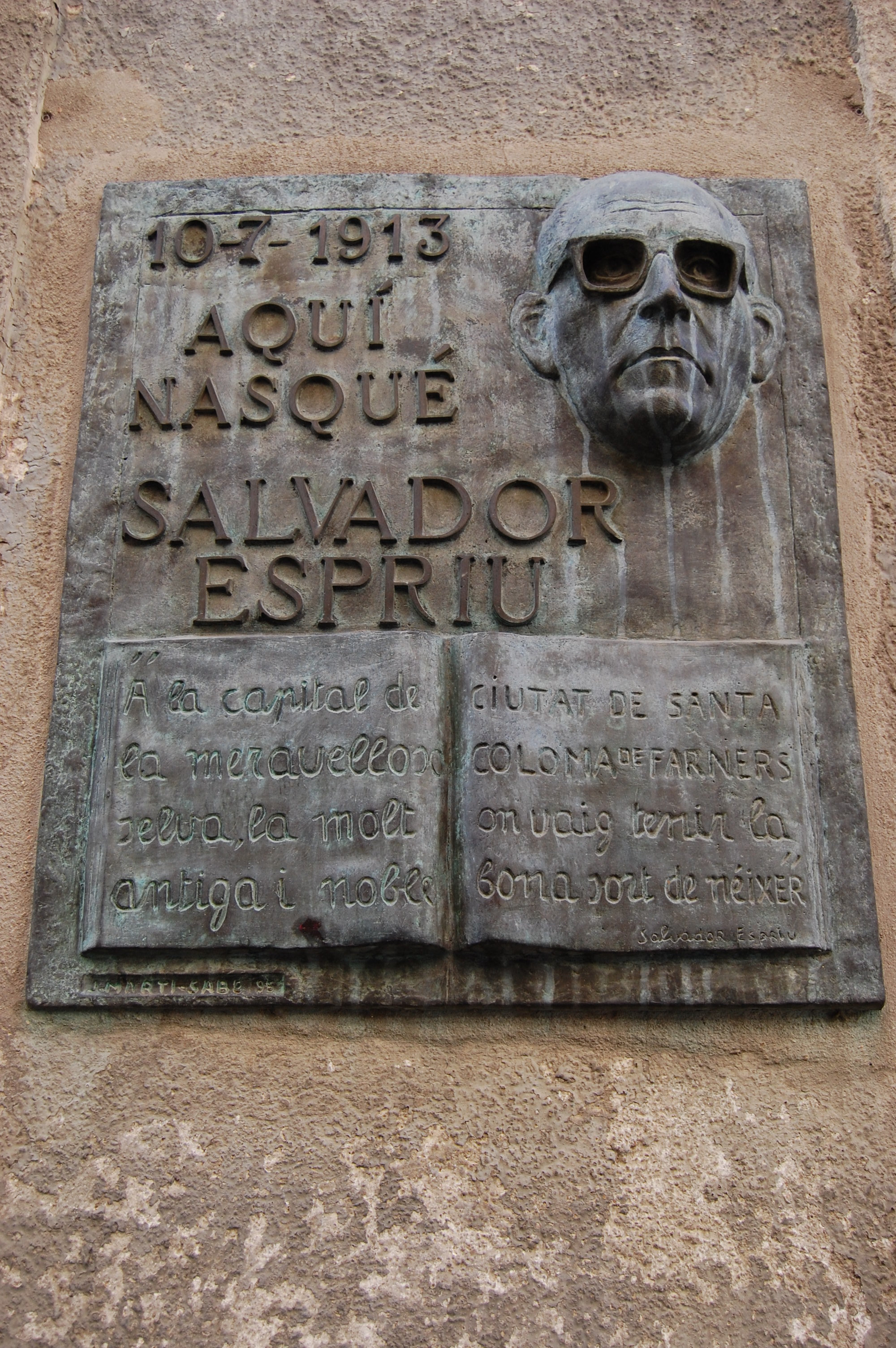 Placa de la casa on nasqué Salvador Espriu. Santa Coloma de Farners